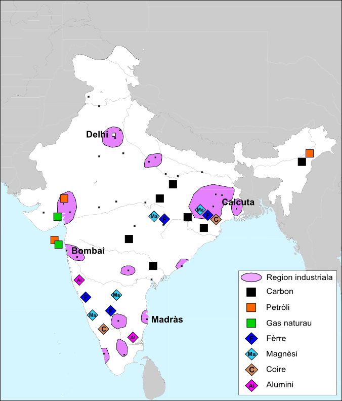 Industria e ressorsas naturalas principalas d'Índia.